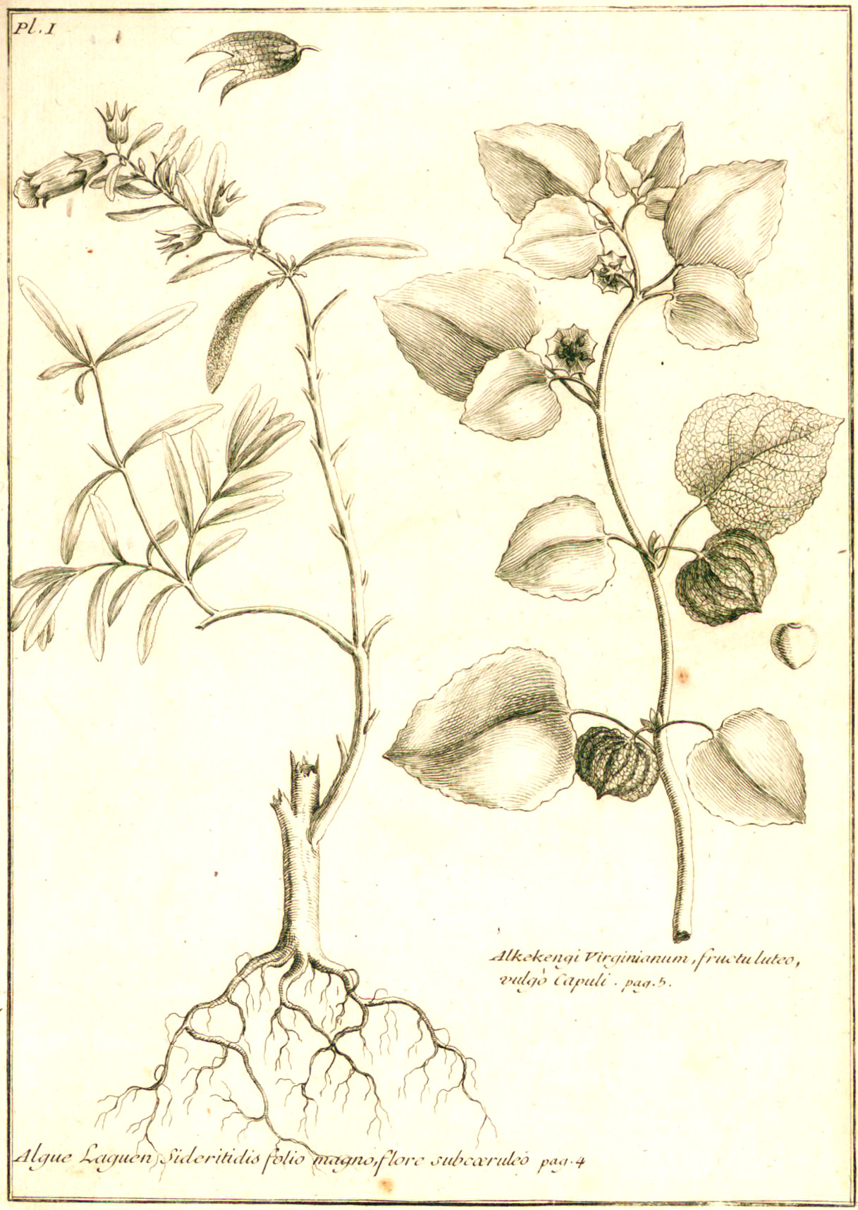 A droite de la planche "Alkekengi Virginianum fructuluteo vulgo Capuli". In: "Journal des Observations Physiques, Mathematiques et Botaniques, faites par l'ordre du roy sur les côtes orientales de l'Amérique méridionale & aux Indes occidentales. Et dans un autre voyage fait par le même ordre à la Nouvelle Espagne & aux Isles de l'Amérique. (Paris-1725)" by Louis Feuillee, (1660-1732).